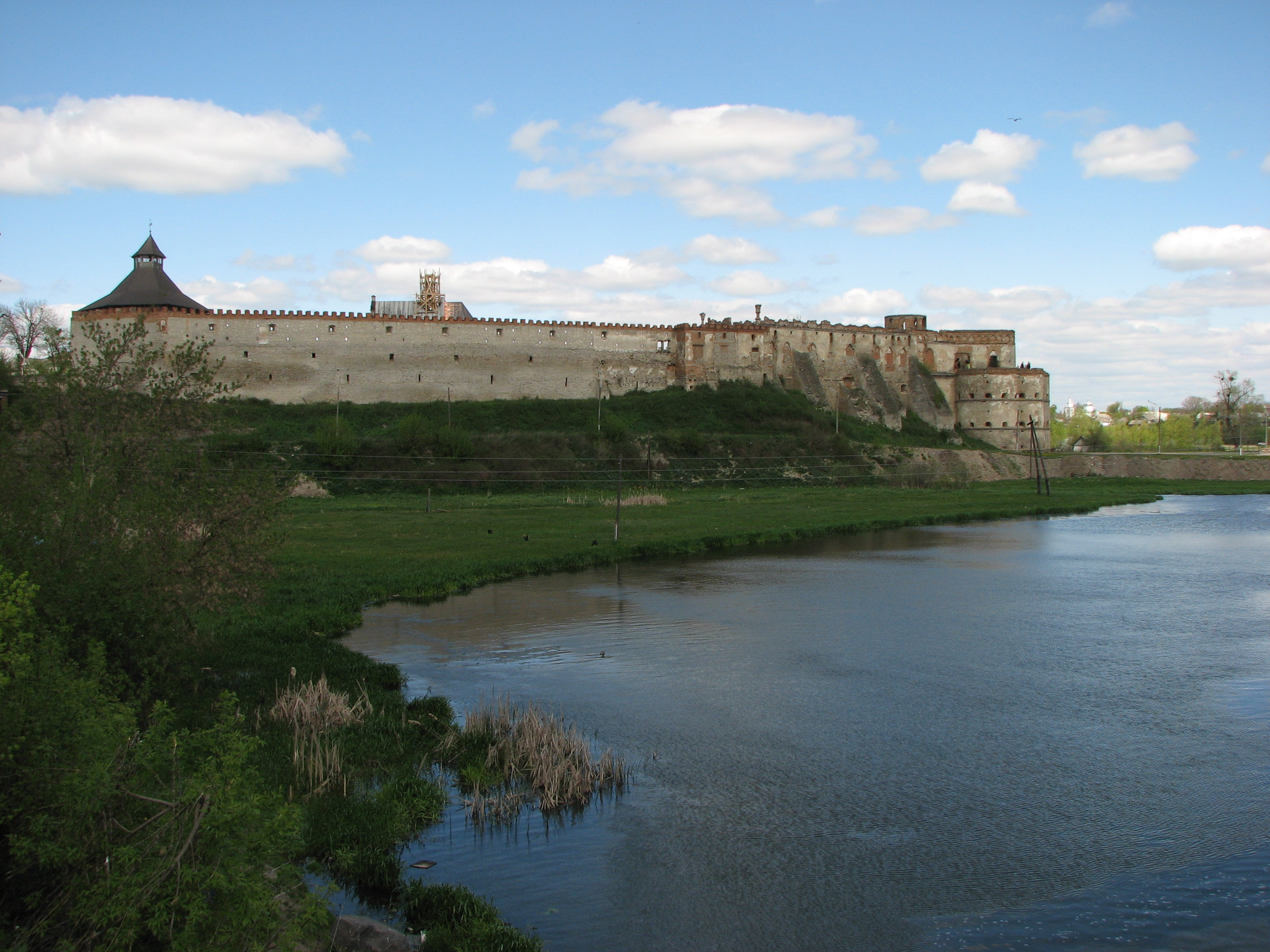 Меджибіж. Замок.